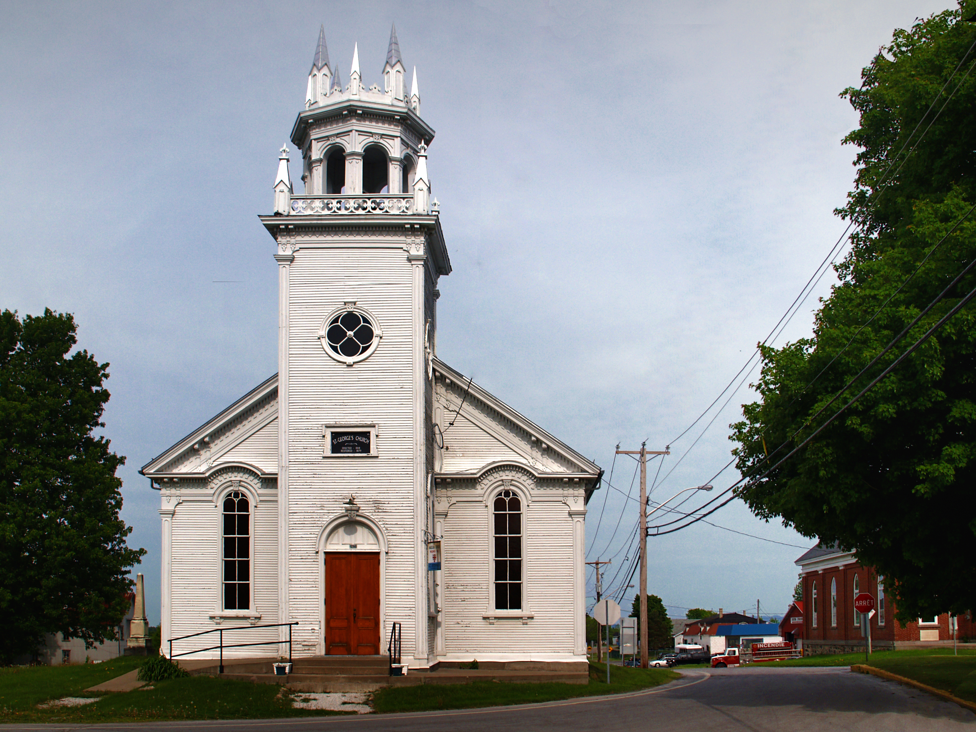 Saint-Georges-de-Clarenceville (Québec) - Èglise anglicane Saint-Georges